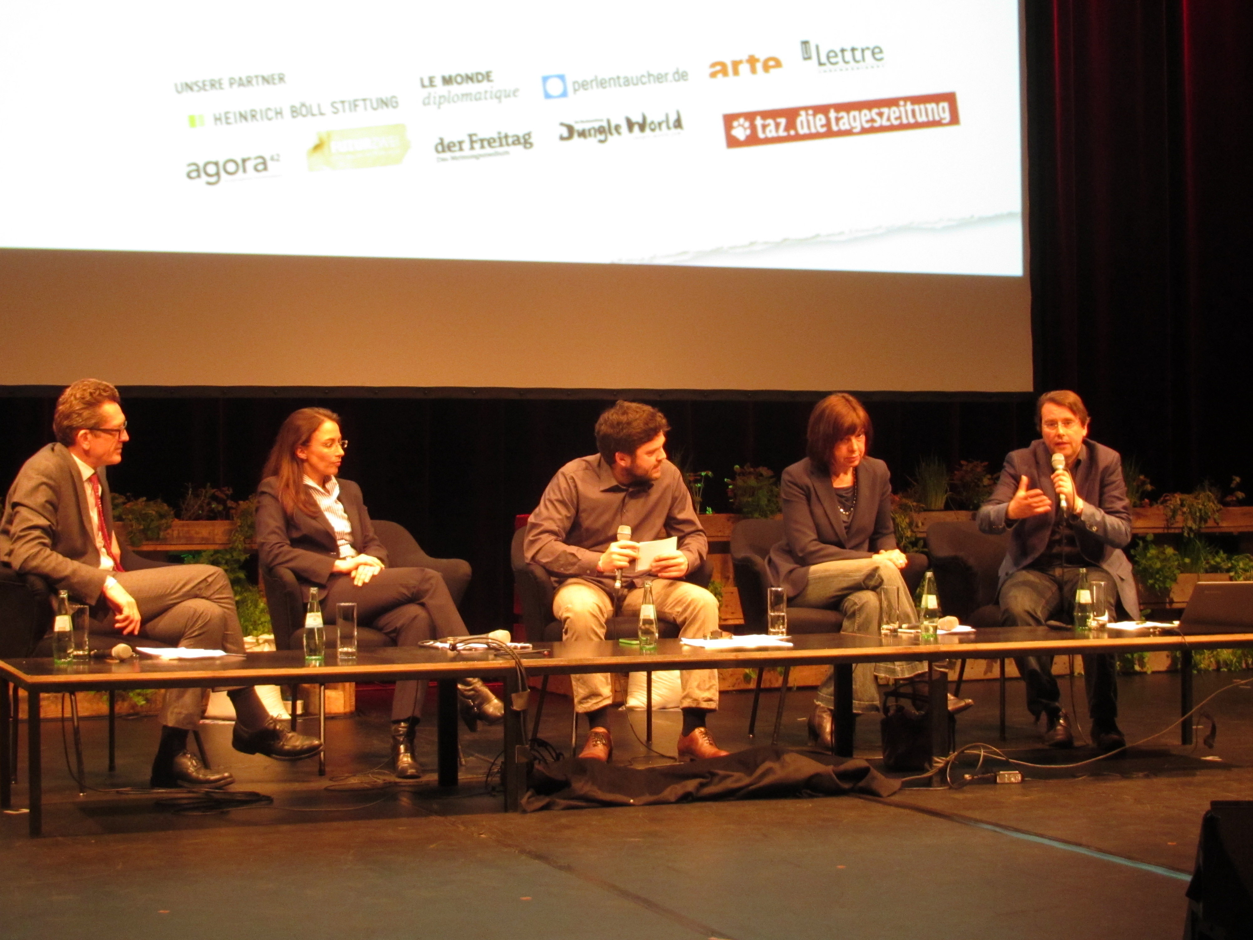 taz.lab, "I love EU – Solidarität ist machbar", Podiumsdiskussion: Highway to Wüstenplanet, "Ist Europa noch Vorreiter im Klimaschutz? Niemand hat vor, den Klimawandel zu stoppen. Längst hat sich die Weltgemeinschaft darauf geeinigt, die Sache allenfalls auf ein erträgliches Maß zu beschränken. Doch wie?", (v.l.n.r) Artur Runge-Metzger, Yasmin Fahimi, Ingo Arzt, Rebecca Harms , Martin Unfried, 12.04.2014 im Haus der Kulturen der Welt in Berlin, Anfang: 11:15 Uhr, Dauer: 01:45, Raum: Auditorium